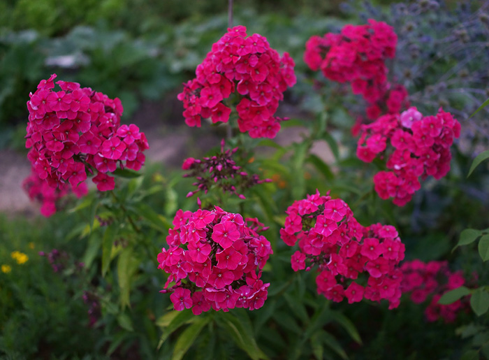 Флокс метельчатый 'Атласный'